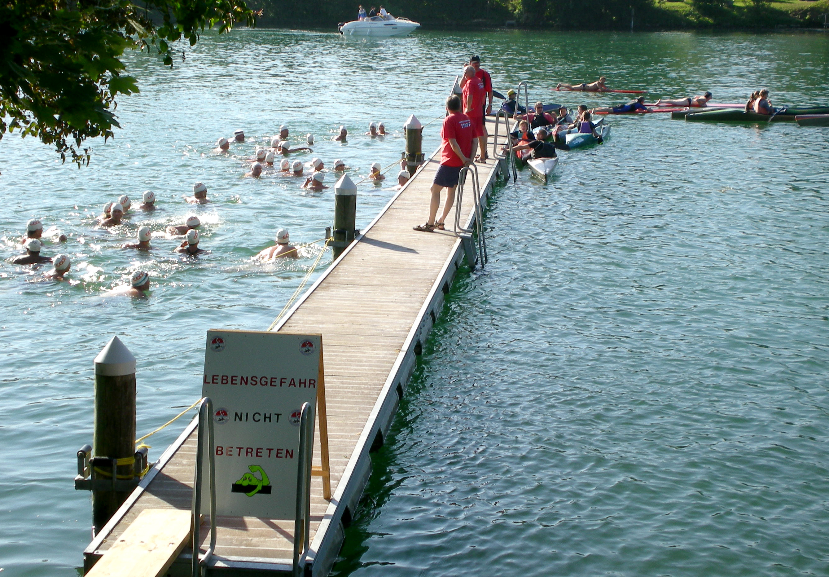 Start zum Aareschwimmen, 1300m = mit Strömung 800m